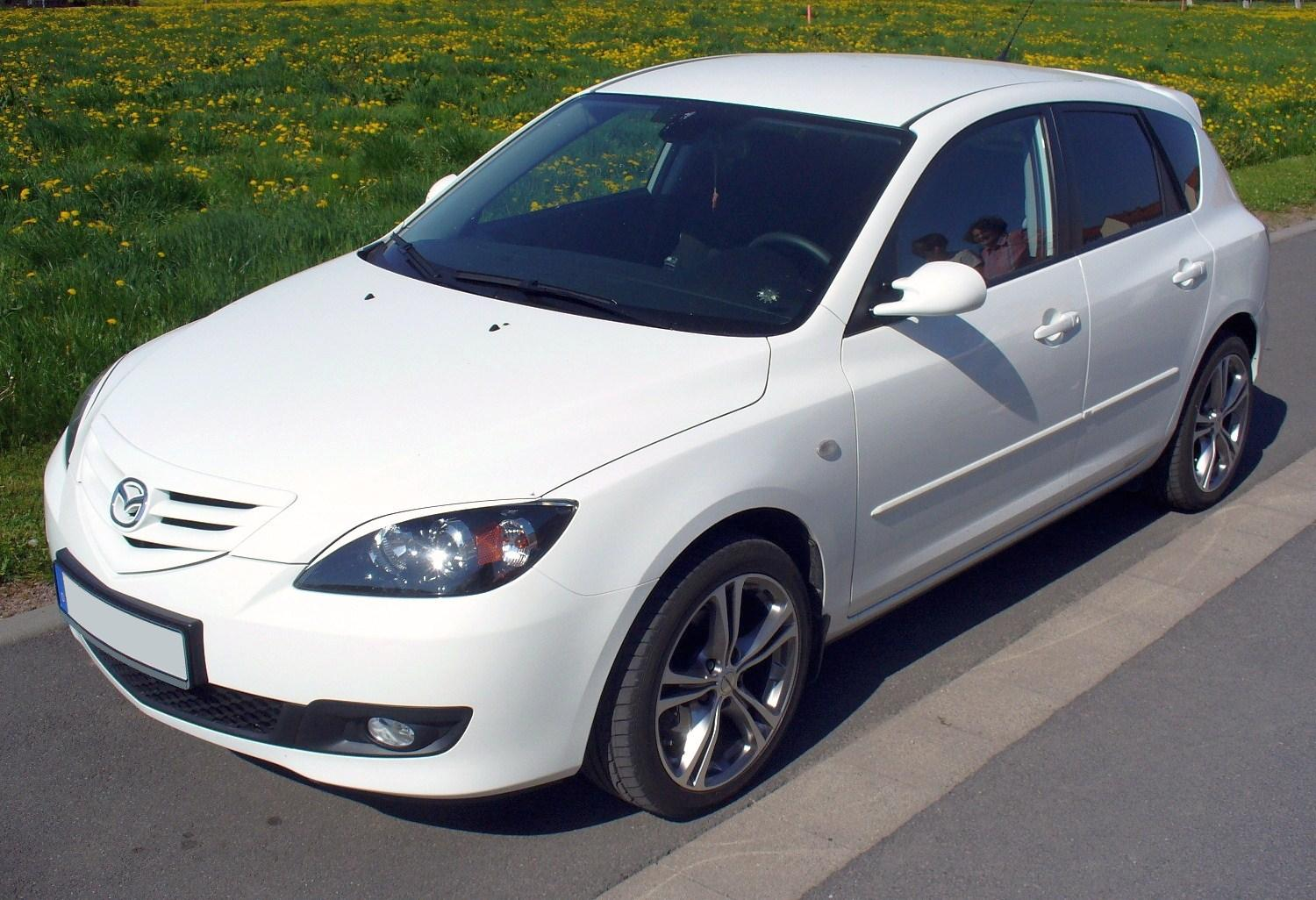 Mazda 3 Sport